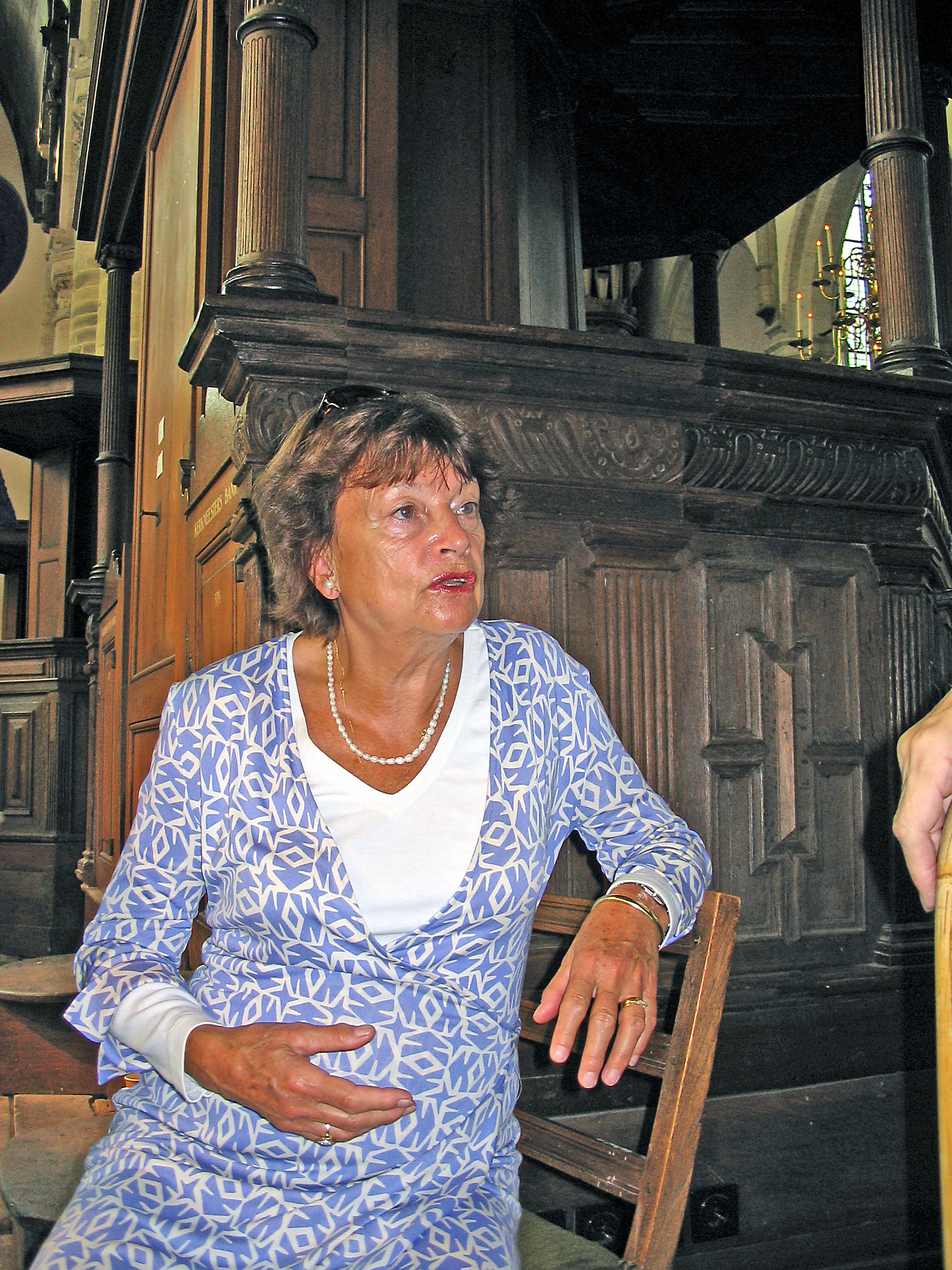 Foto van Rita Kohnstamm